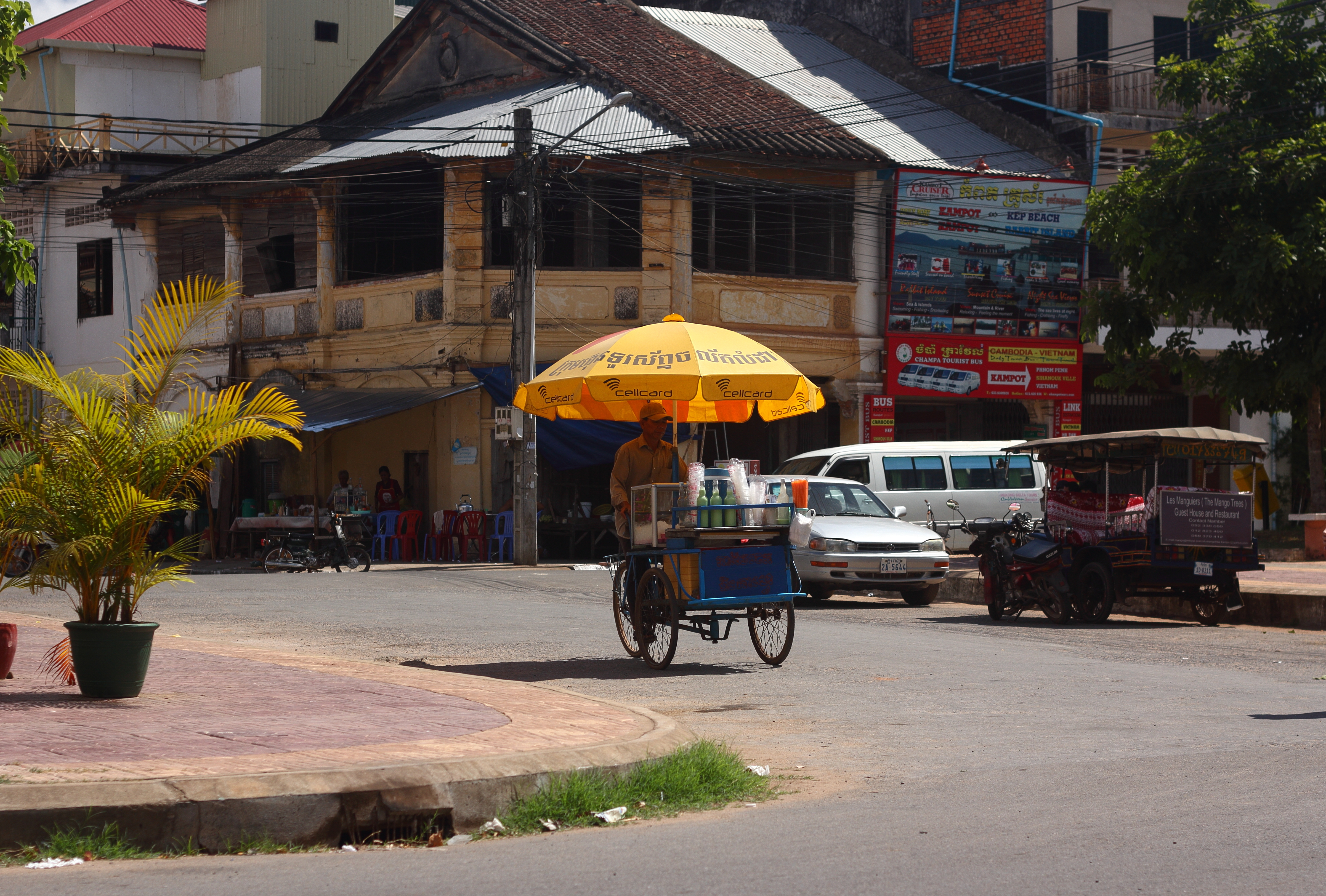 Камбоджа, провинция Кампот.